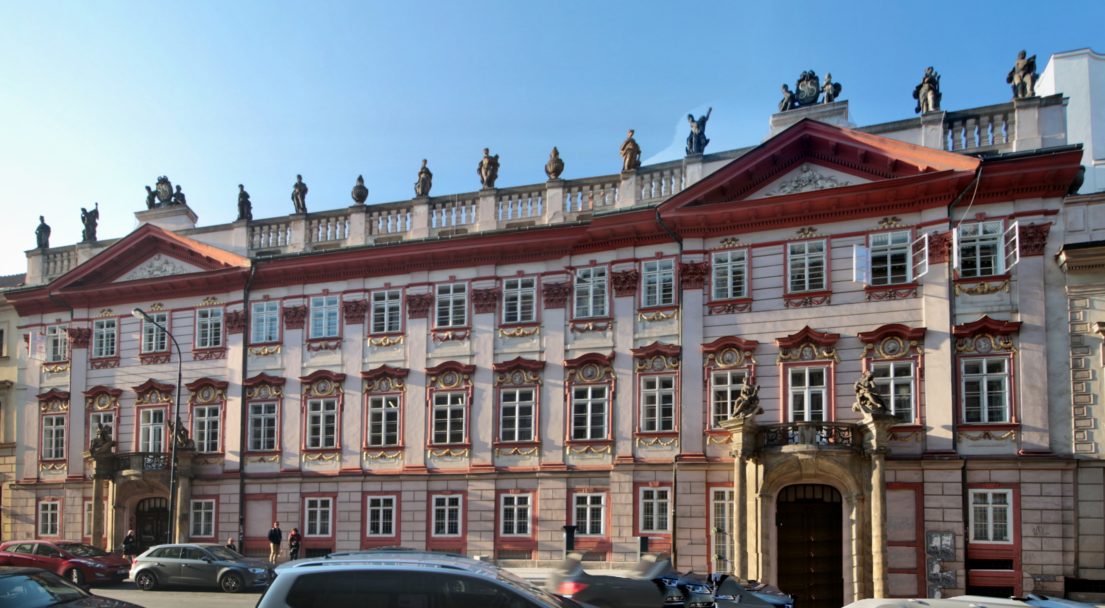 Praha, Hybernská ulice, Swéerts-Šporkův palác